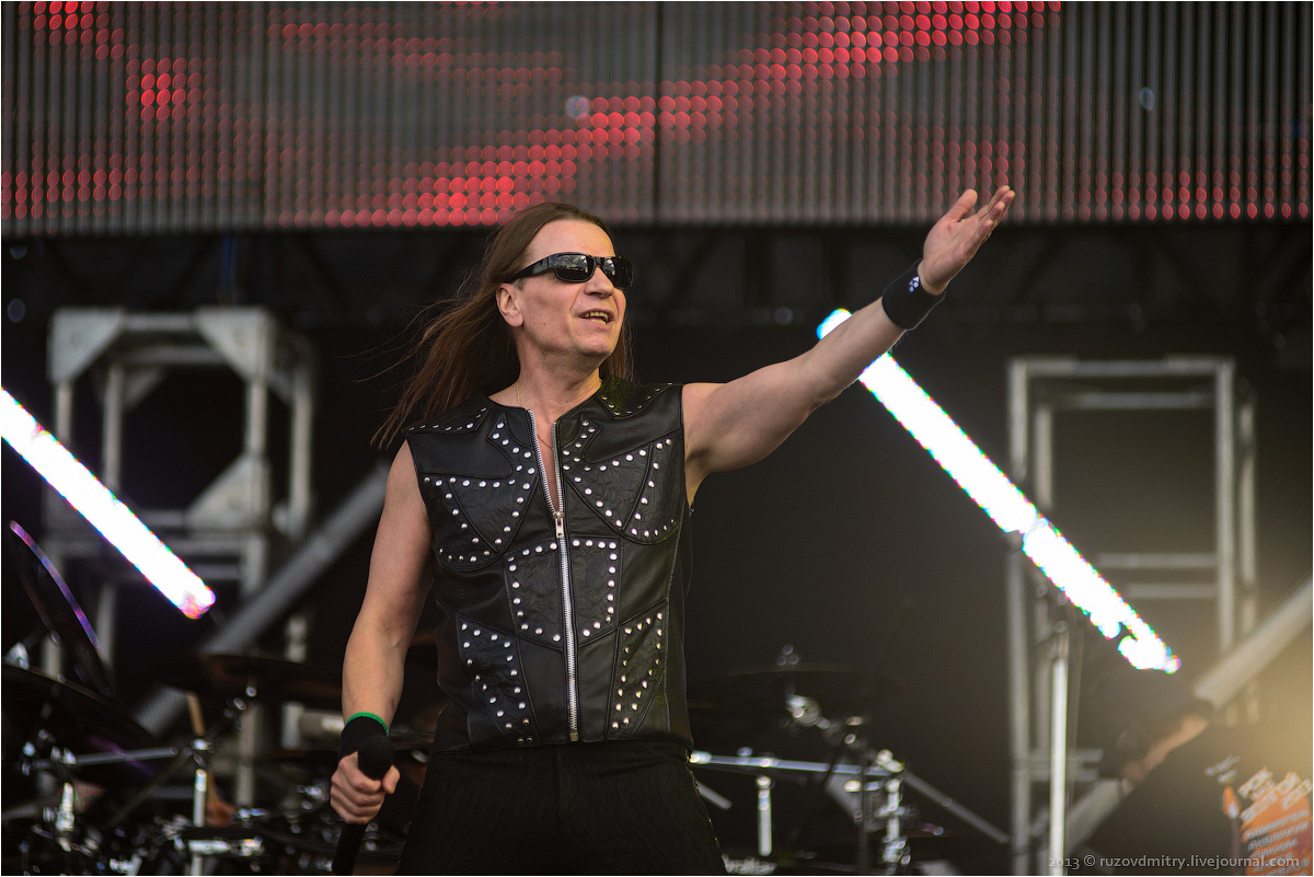 Валерий Кипелов, фестиваль "Рок над Волгой" 2013